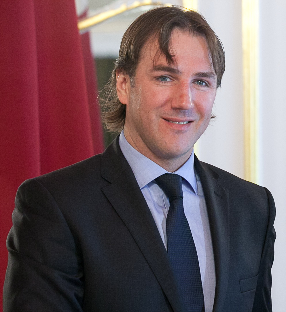 Viktors Ignatjevs